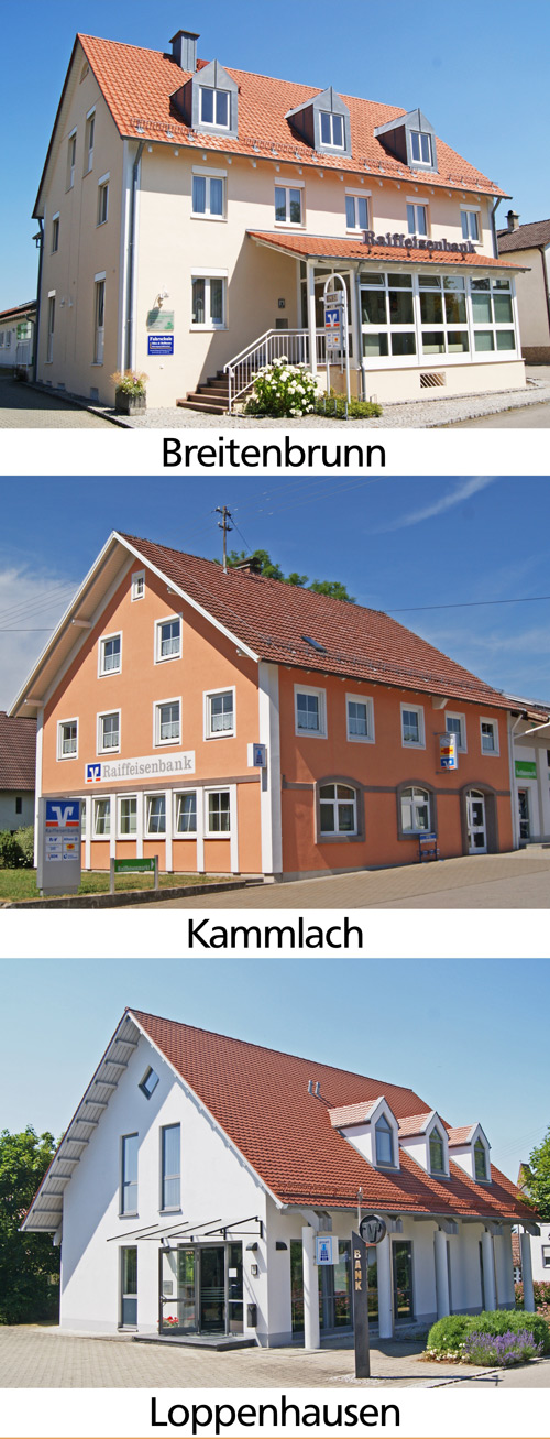 Filialen der Raiffeisenbank Pfaffenhausen eG